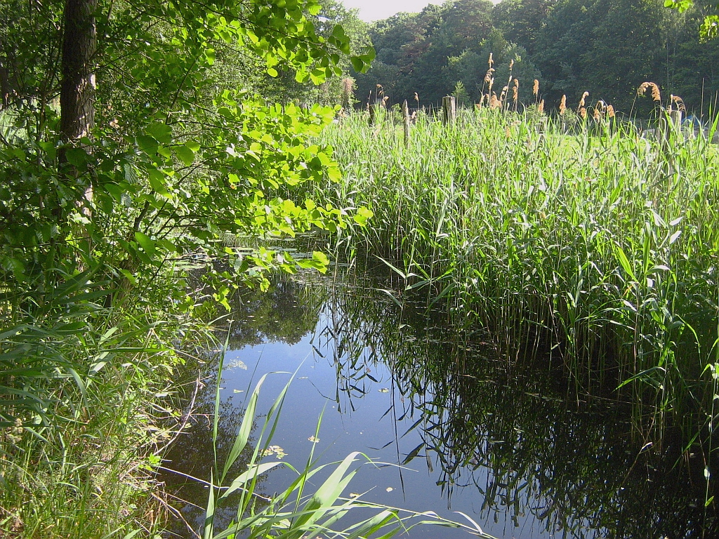 Der Stromgraben entwässert den größten Teil der Rostocker Heide. Er mündet bei Torfbrücke (Zeltplatz Ulenflucht) in die Ostsee.